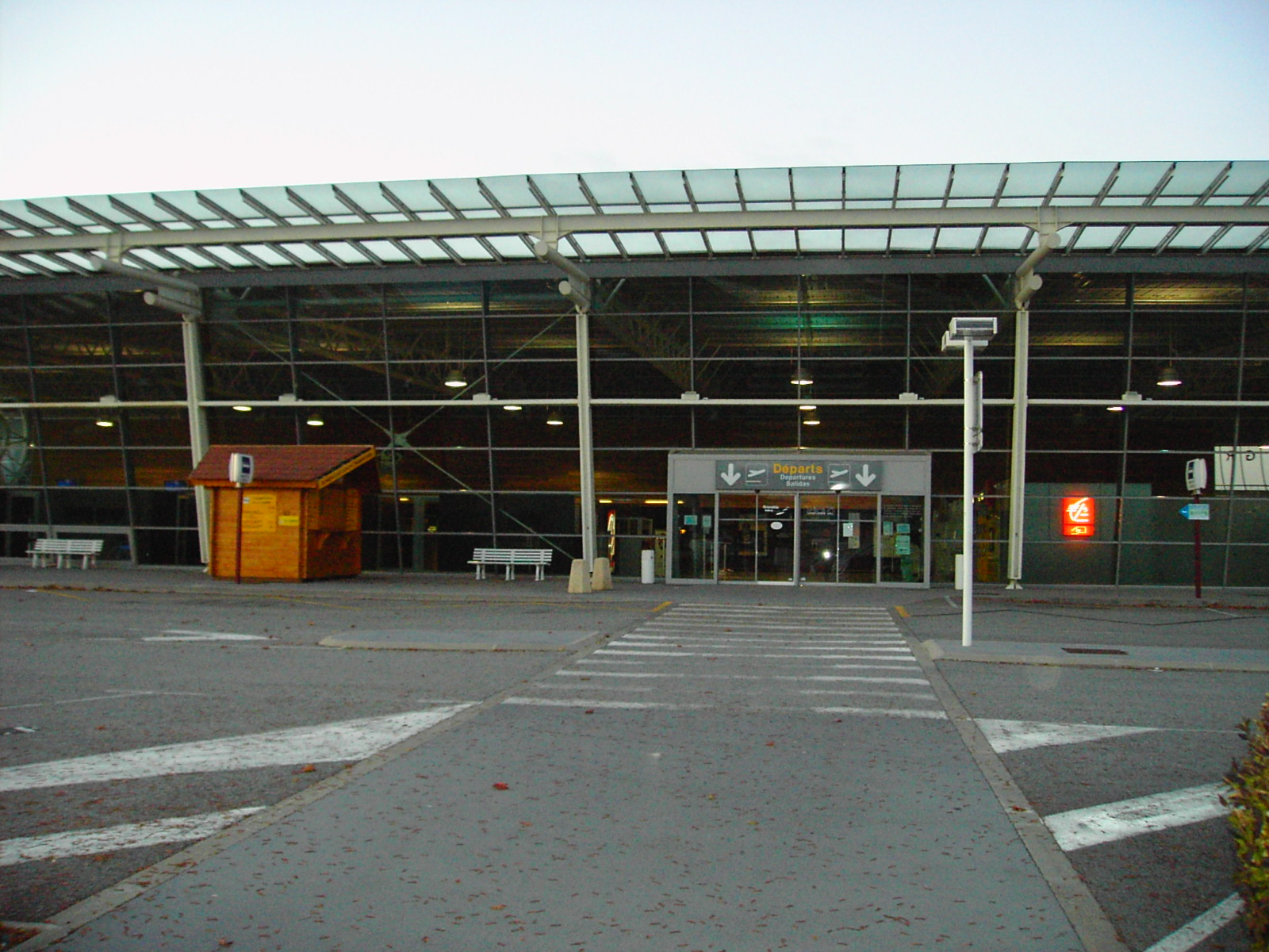 entrée aéroport Grenoble-Isère